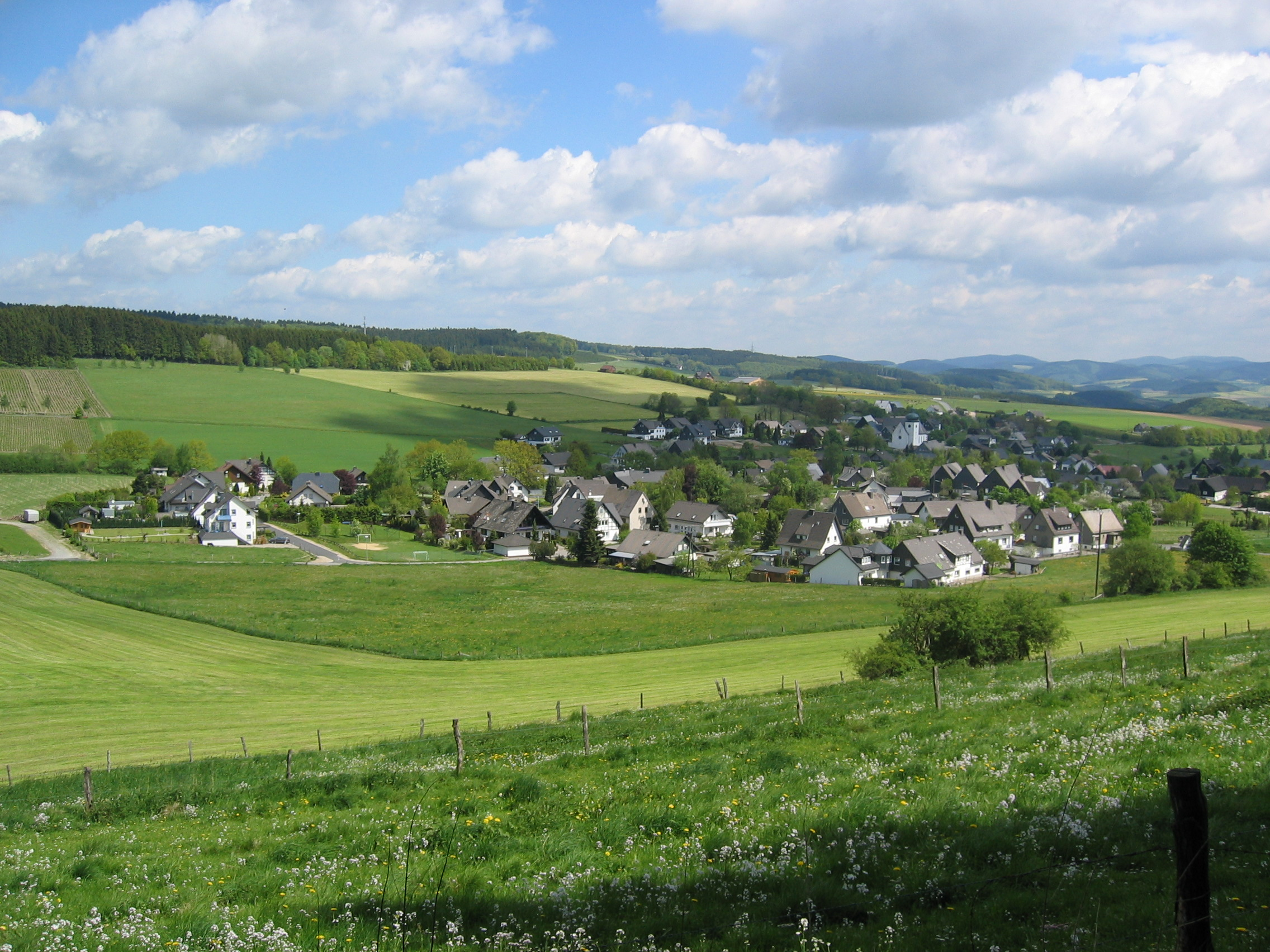 Ortsbild Bracht aus Richtung Süd-West